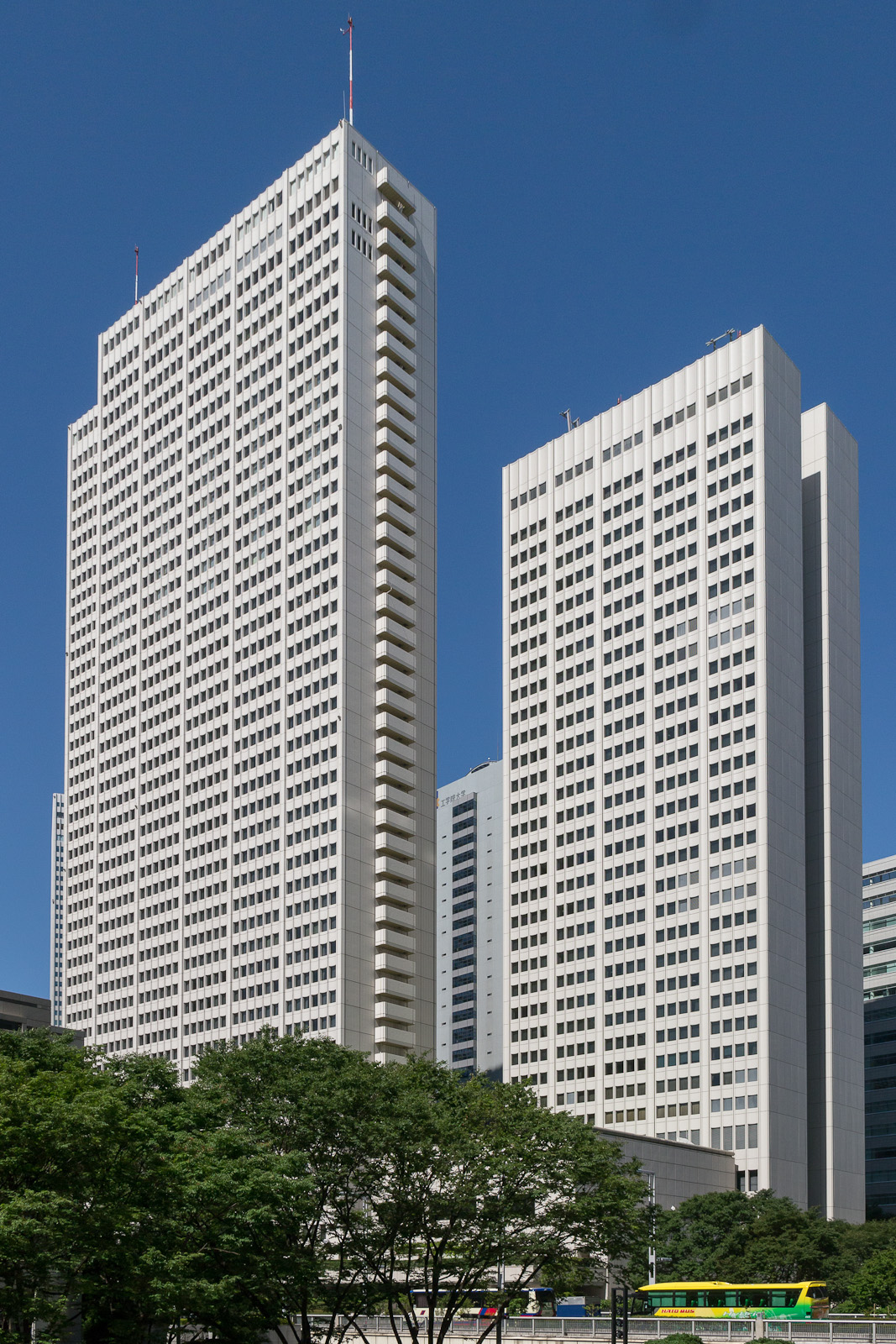 京王プラザホテル本館（左）と南館（右）、東京都新宿区西新宿。